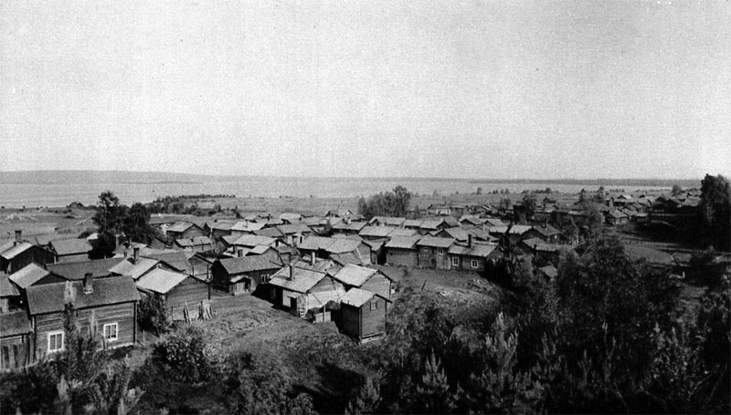 Bonäs by, Mora